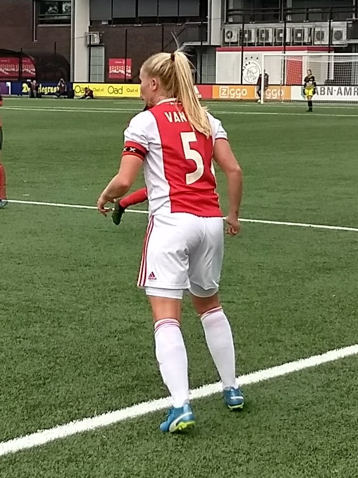 Kika van Es in Ajax-kleuren